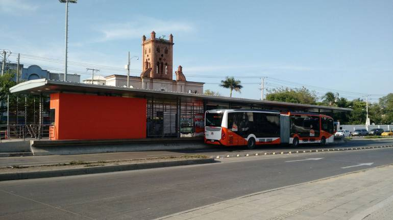 Estacion Maria Auxiliadora